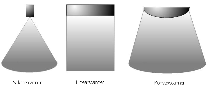 Sondenspezifische Bildentstehung Scanbereich der einzelnen Ultraschallsondentypen (Sektor-, Linear-, Konvexsonde).